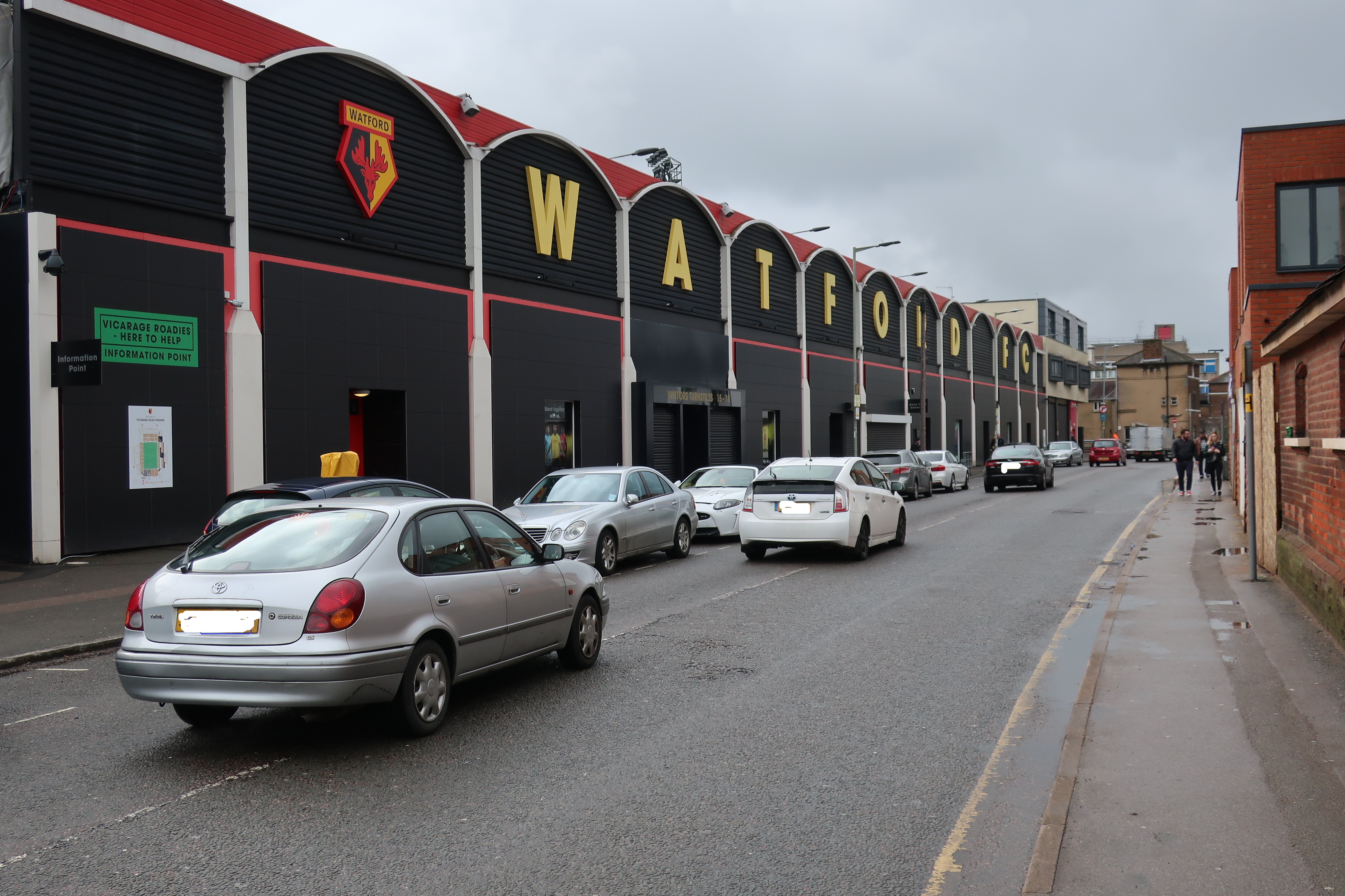 Watford FC:n stadion ulkopuolelta Vicarage Roadin puolelta pääsiäisenä 2018.